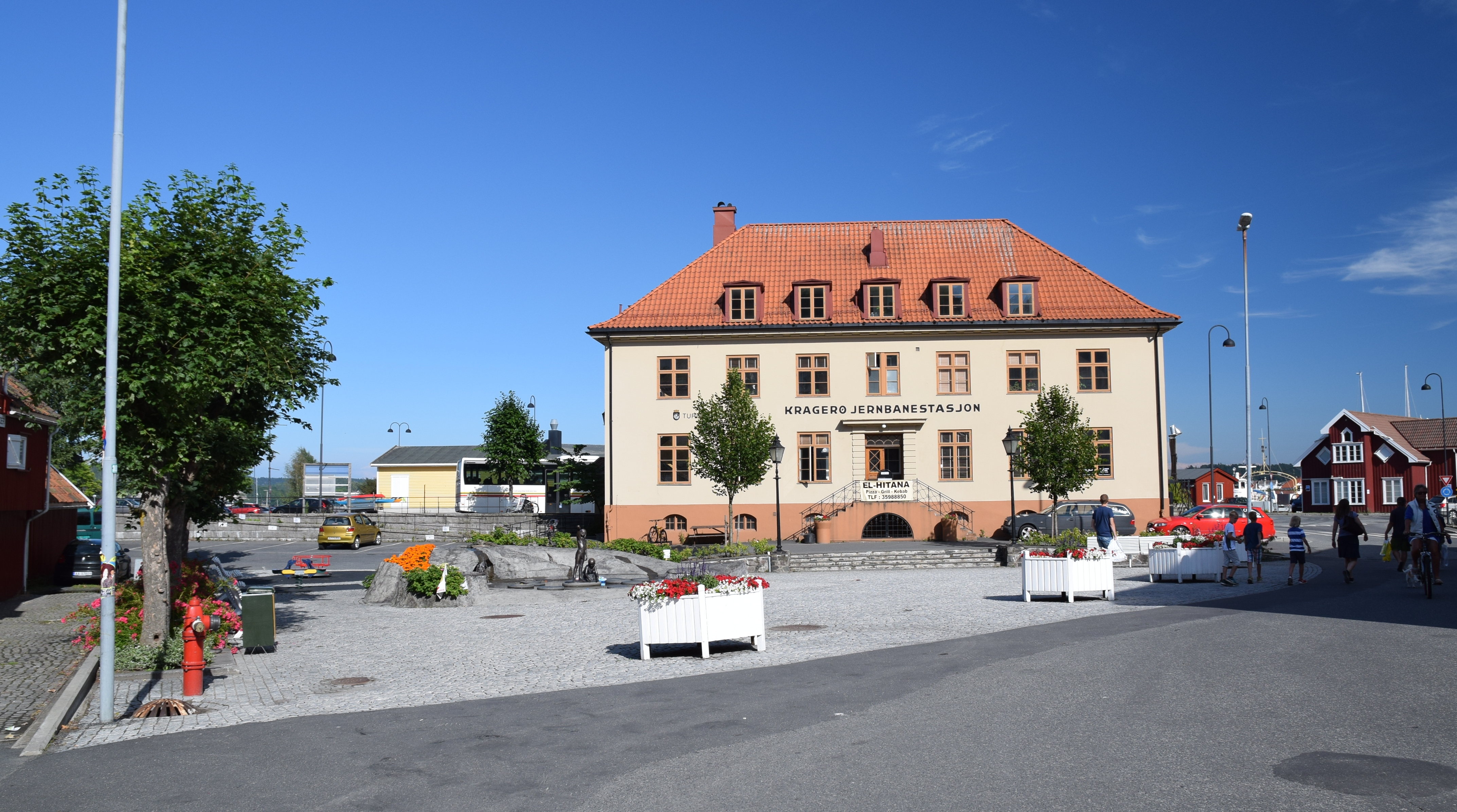 Kragerø jernbanestasjon med plassen vest for bygningen